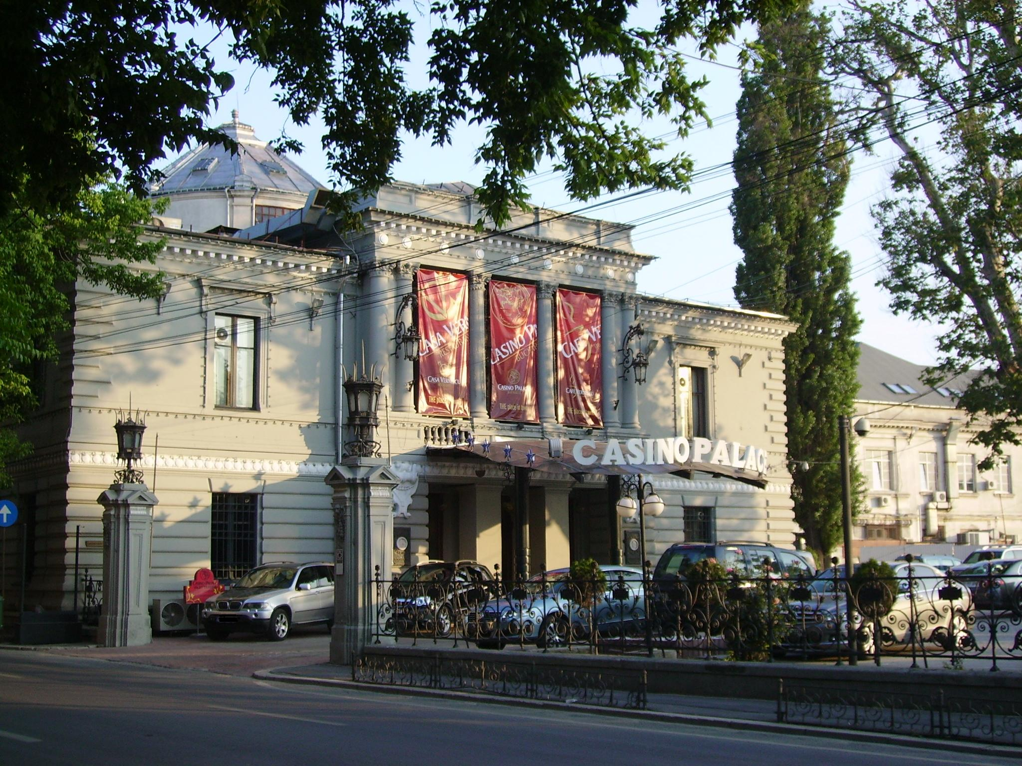 Casa Vernescu, Calea Victoriei, Bucureşti